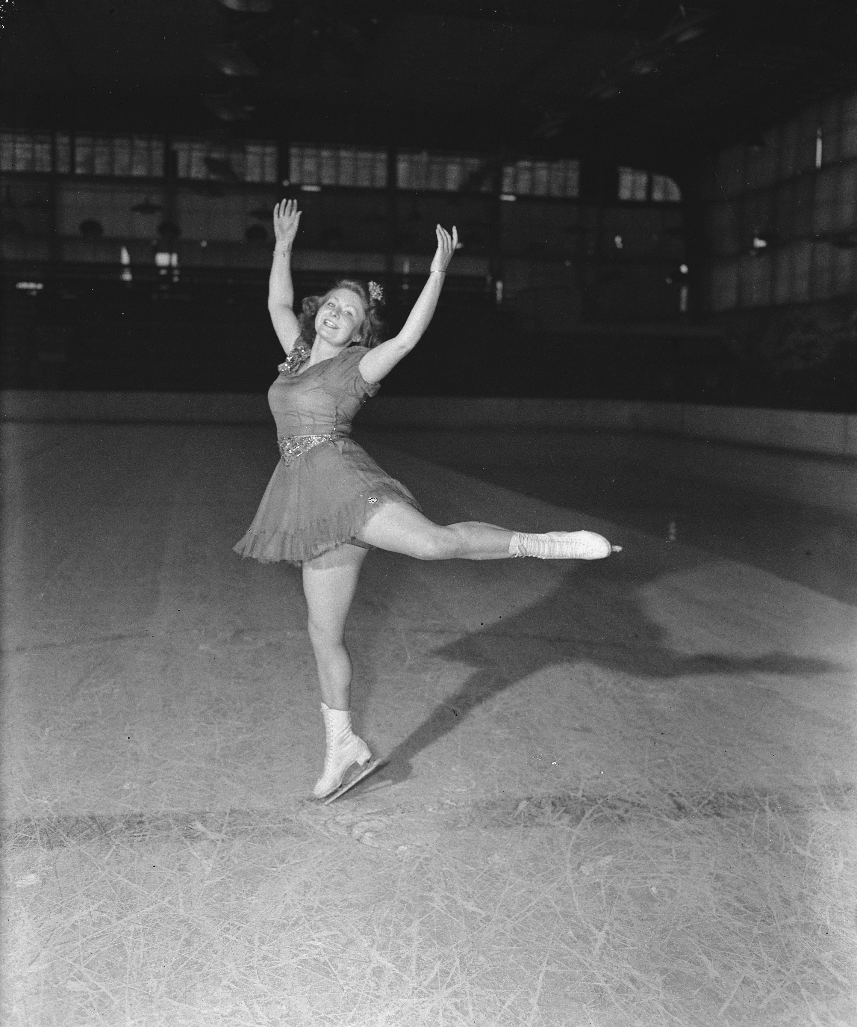 Collectie / Archief : Fotocollectie Anefo Reportage / Serie : [ onbekend ] Beschrijving : Daphne Walker Datum : 18 februari 1946 Persoonsnaam : walker daphne Fotograaf : Raucamp, Koos / Anefo Auteursrechthebbende : Nationaal Archief Materiaalsoort : Glasnegatief Nummer archiefinventaris : bekijk toegang 2.24.01.09 Bestanddeelnummer : 901-4760